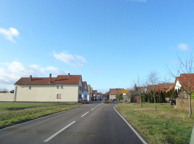 Gommersheim, Ortseinfahrt